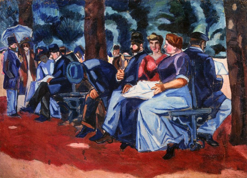 Алексей Моргунов. Под розовой тенью. 1911. Холст, масло. 101 х 142. Курская областная картинная галерея имени А. А. Дейнеки